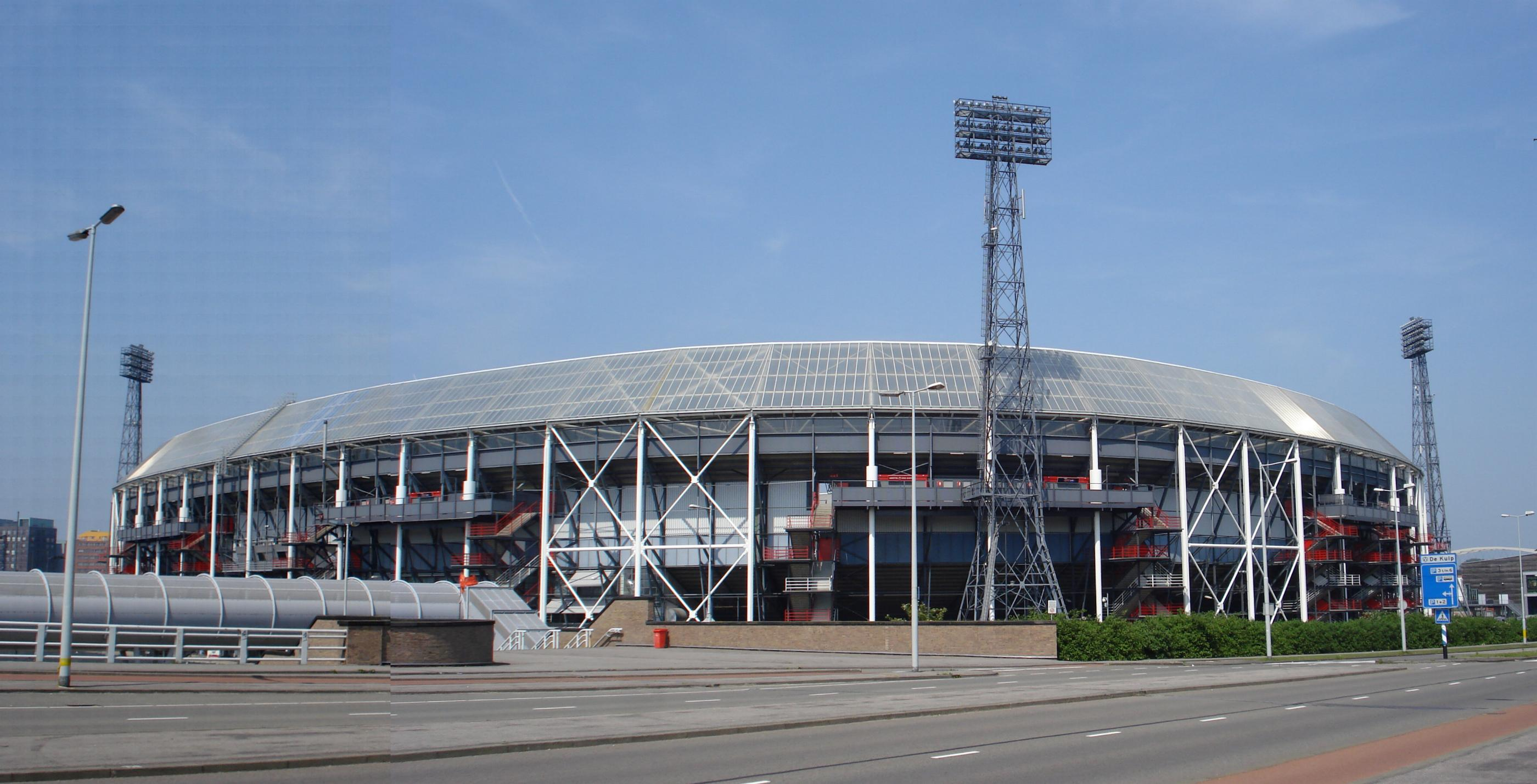 Rotterdam, Feyenoord_stadion "De Kuip". Gemeentemonument.